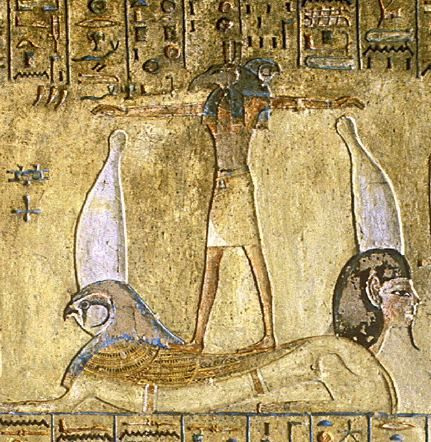 Illustration de la 10e Heure du Livre des Portes" consacrée au massacre d'Apophis. Ici on voit une forme du dieu solaire qui combine ses aspects de Seth et Horus en un seul personnage.